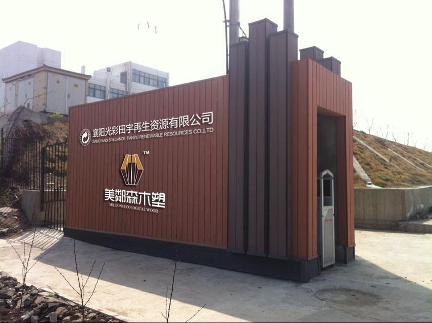 WPC engineered flooring 木塑装饰地板